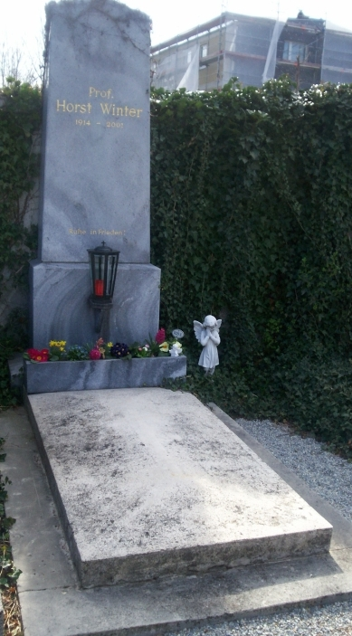 Horst Winter Grabstätte in Pottendorf